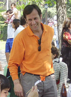 Clemente Perez